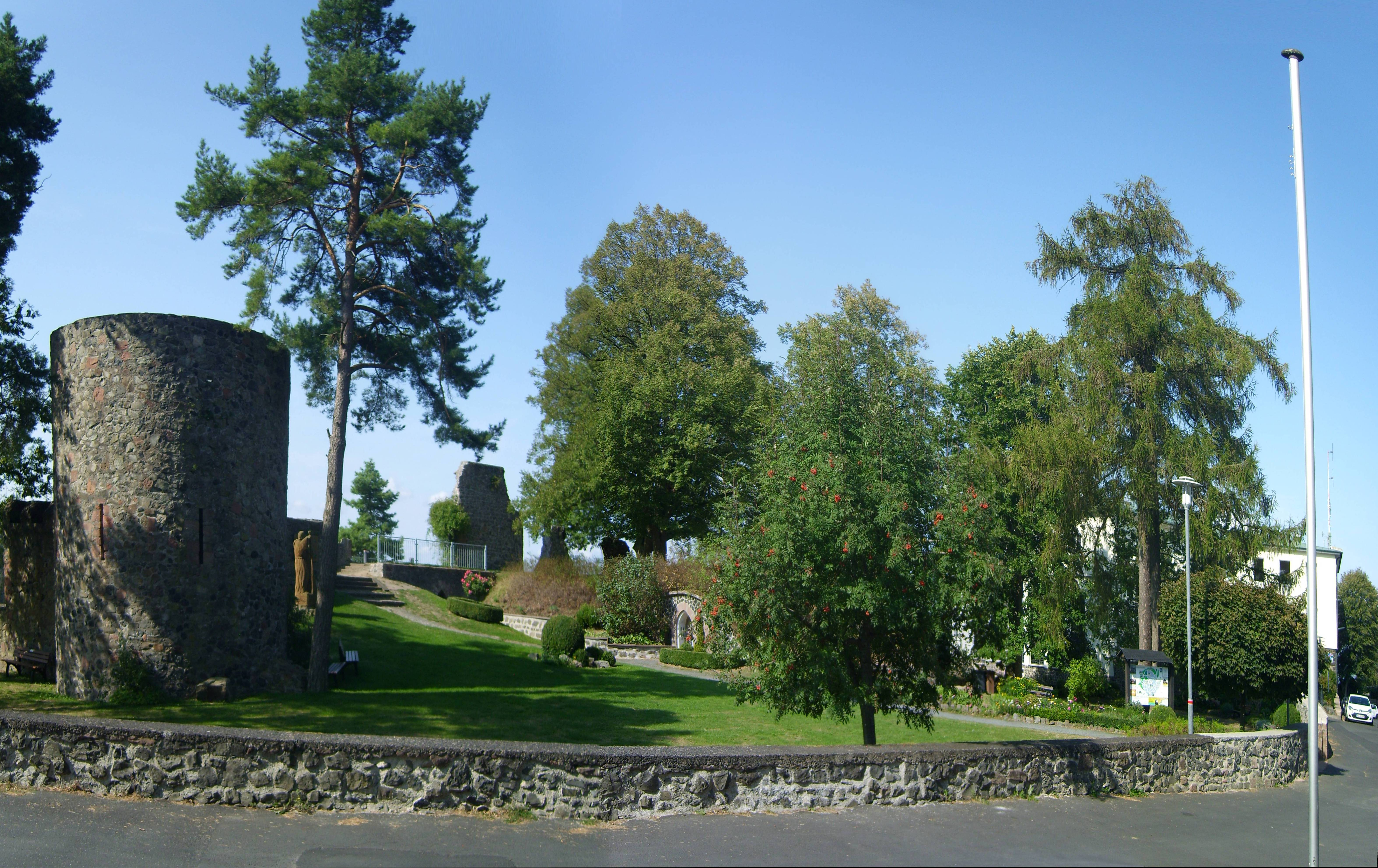 Innenhof der Burg Amöneburg, rechts das Rabanushaus der Stiftsschule St. Johann; Amöneburg.